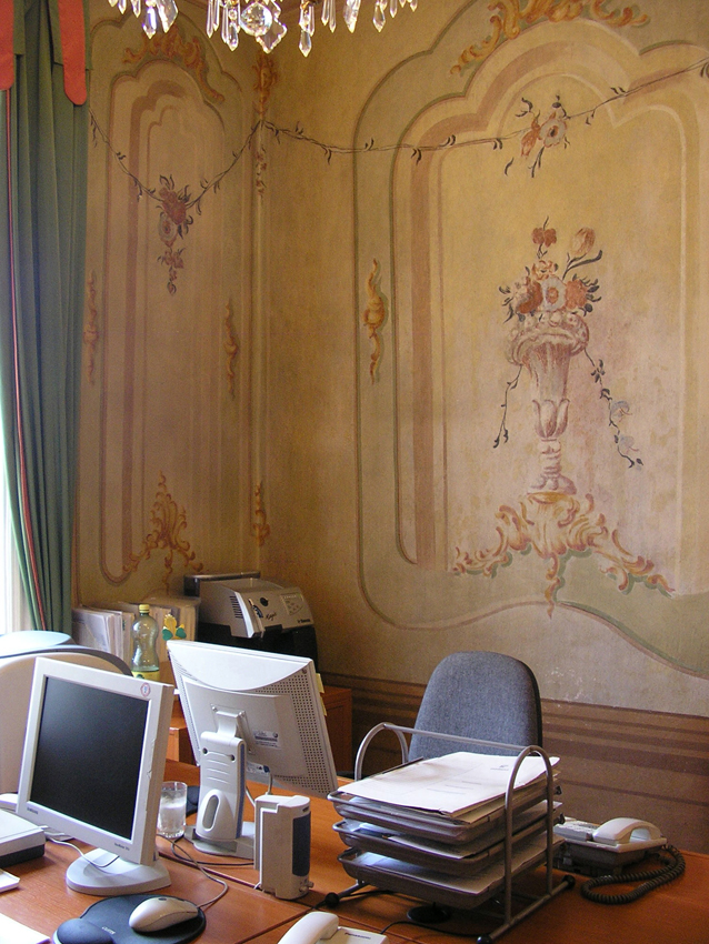 Az egykori De la Motte-palota. - Magyarország, Budapest, I. kerület, Budai Várnegyed, Dísz tér 15.